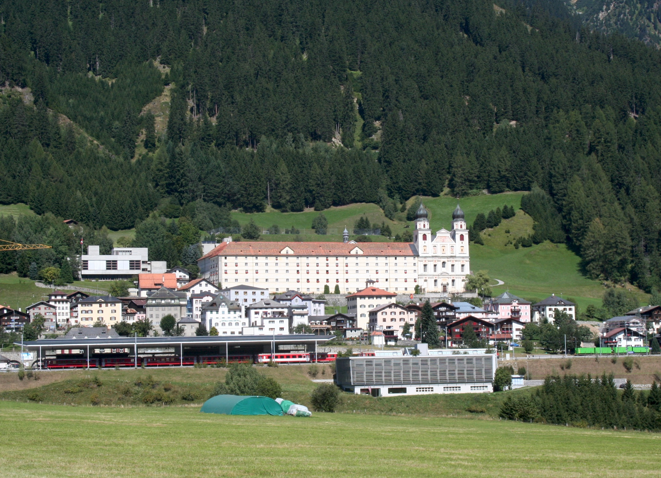 Kloster Disentis